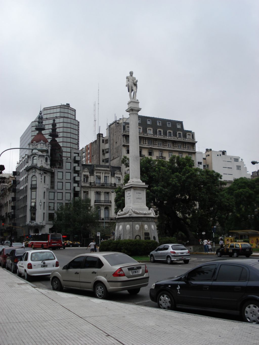 Monumento al General Lavalle en la Ciudad de Buenos Aires, Argentina